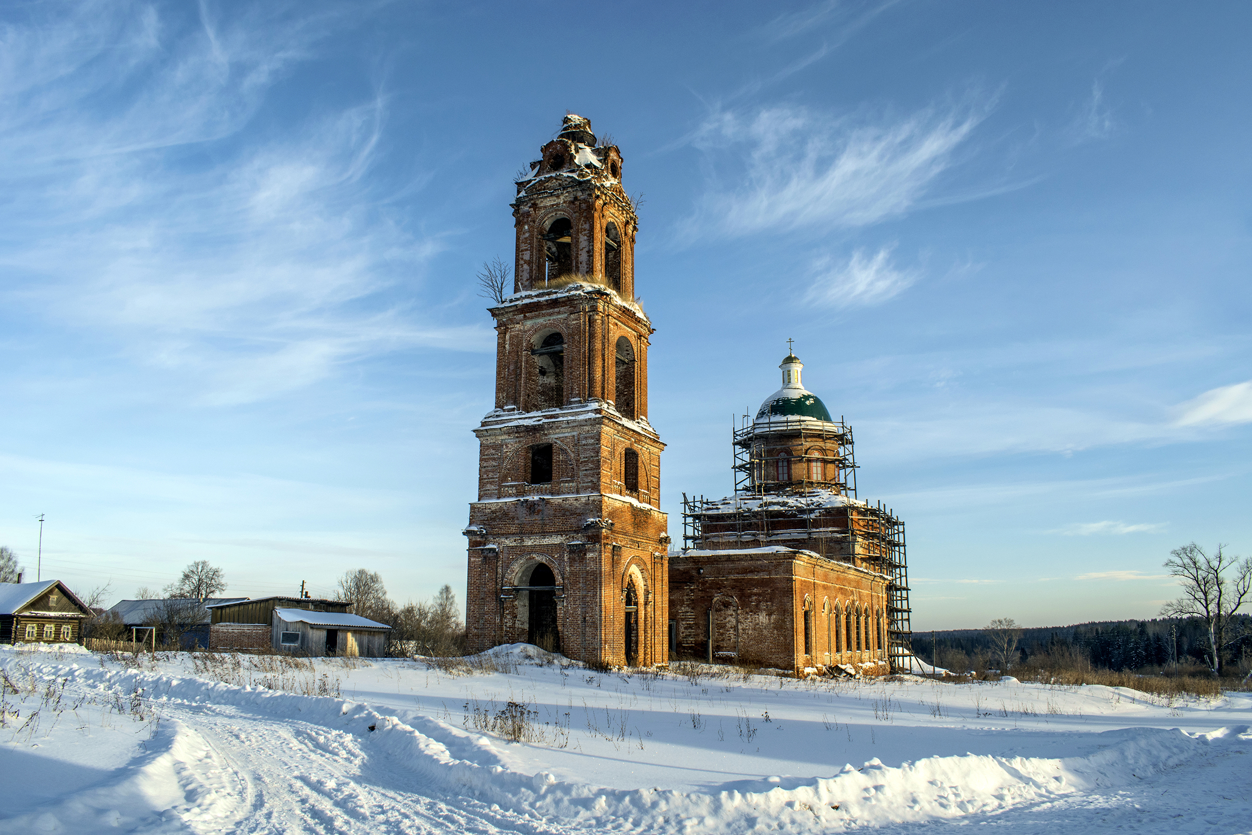 Ансамбль Преображенской церкви: Селезениха, Кирово-Чепецкий район, Кировская область